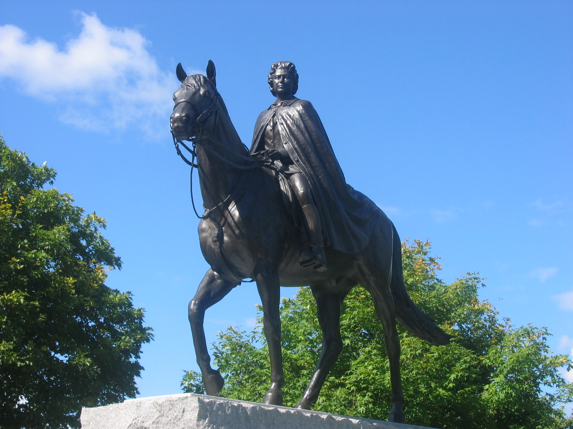 Statue d'Élizabeth II du Royaume-Uni, Colline du Parlement, Ottawa